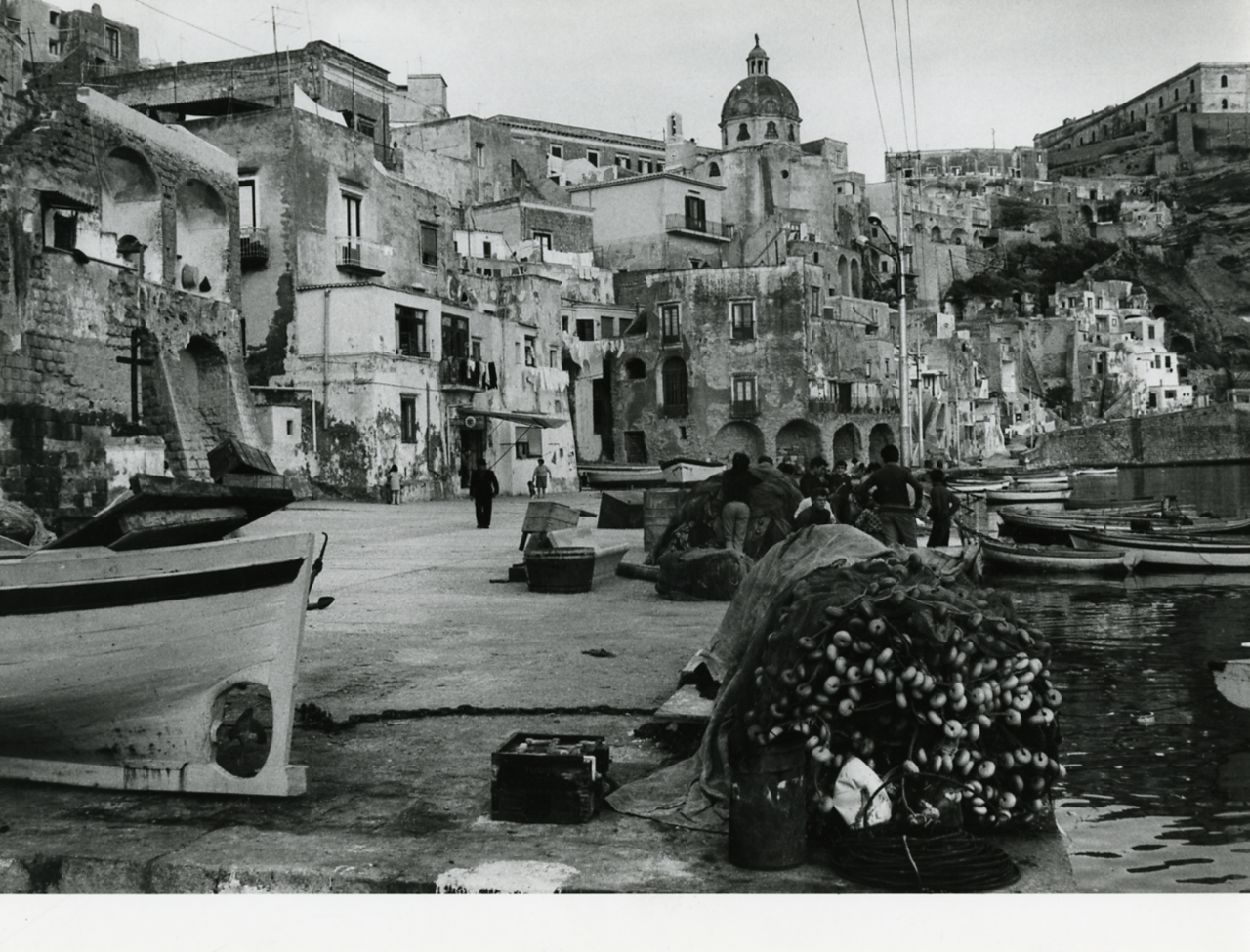 Procida (isola di). Architettura spontanea. Marina Corricella. Porto dei pescatori, vista verso la Chiesa della Madonna delle Grazie Servizio fotografico : Procida, 1972 / Paolo Monti. - Stampe: 3 : Positivo b/n, gelatina bromuro d'argento/ carta, 24x30. - ((Al verso delle stampe manoscritti i numeri dei negativi corrispondenti (formato 35 mm) con indicazione del fotogramma: 1898/1, 1900/32, 1900/33. - timbro a inchiostro con copyright: "© Copyright/ Credit to/ Paolo Monti/ Corso Sempione [...]/ Milano". - Sul coperchio della scatola iscrizione didascalica manoscritta a pennarello nero: "Procida". - Occasione: Documentazione per uno studio fotografico sull'architettura dell'isola (non pubblicata). - Fonte: Quaderno di Paolo Monti: Leica 1501-3000 Controllo numerazione (1950-1978), presso Archivio Paolo Monti. - Fonte: Agenda di Paolo Monti: Monti - Agenda 1972 (1972/04/01), presso Archivio Paolo Monti. - Fonte: Lettera di Paolo Monti: XII. Documenti vari 1982-2000/ Procida (1968), presso Archivio Paolo Monti. Corrispondenza tra l'Architetto Giancarlo Cosenza e Paolo Monti sul progetto di pubblicazione di uno studio fotografico sull'architettura dell'isola di Procida